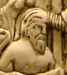 Plaque de reliure en ivoire, Reims, dernier quart du IXème siècle. Musée de Picardie à Amiens. Le baptême de Clovis par saint Remy avec le miracle de la Sainte Ampoule.